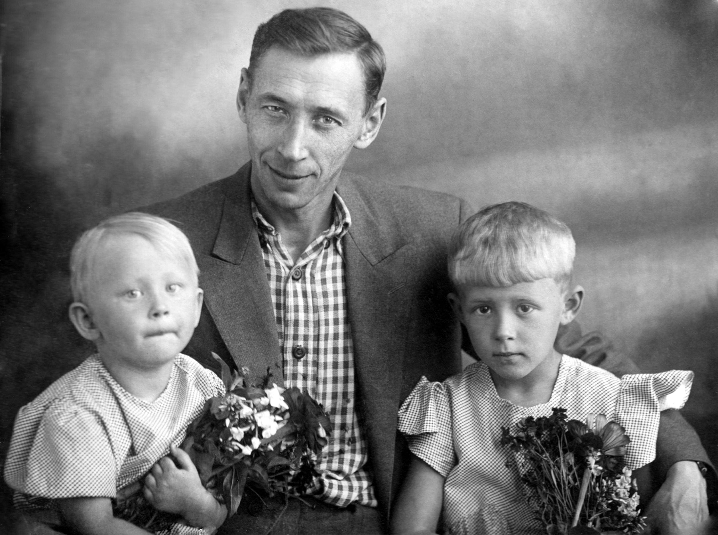 Николай Иванович Маркин с детьми - Вера и Галина, перед отправкой их в Орехово-Зуево. Июль 1941 года.